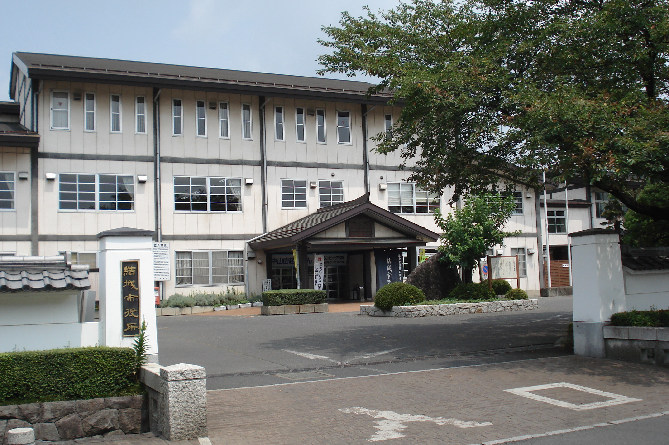 茨城県結城市役所